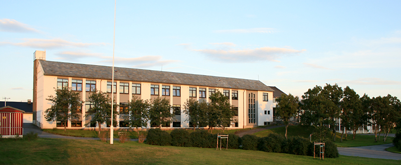 Brønnøysund videregående skole, Brønnøysund.